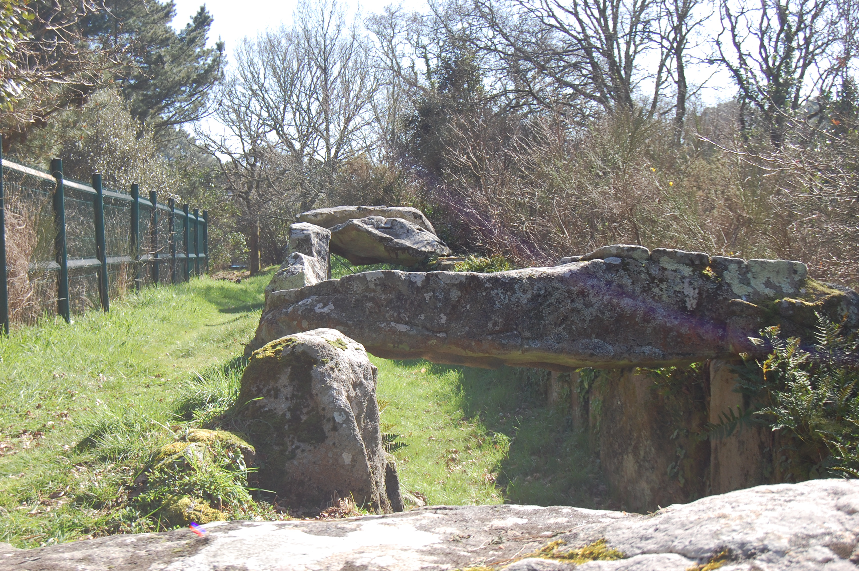 Allée couverte Er Rohr ou Mané Roularde, la Trinité-sur-Mer, Morbihan